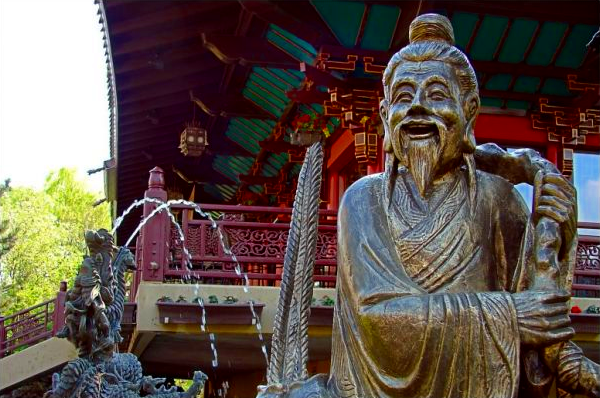 Ein Dekorationsdetail aus dem Chinesischen Teil des Phantasialands, Germany